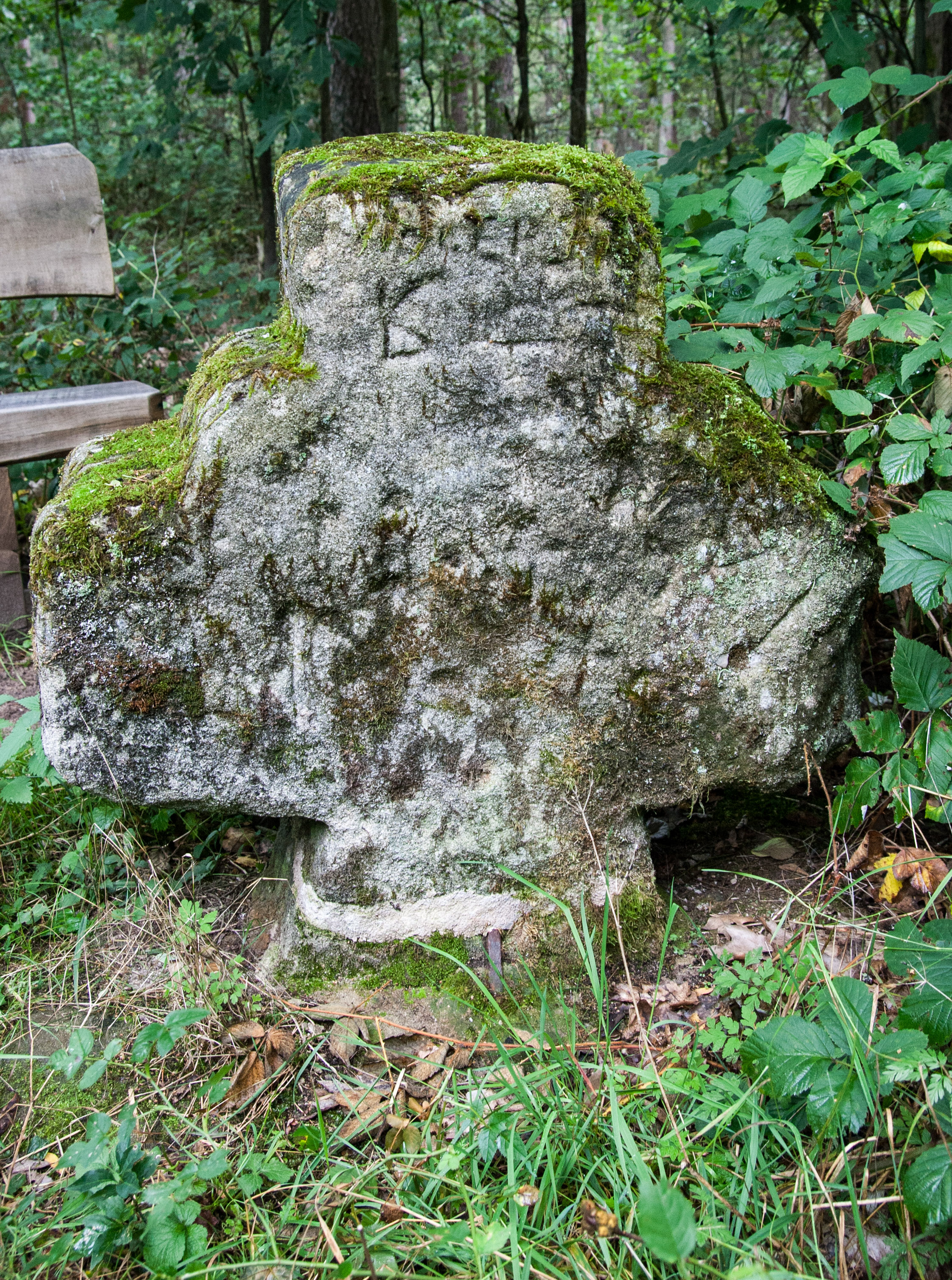 Steinkreuz